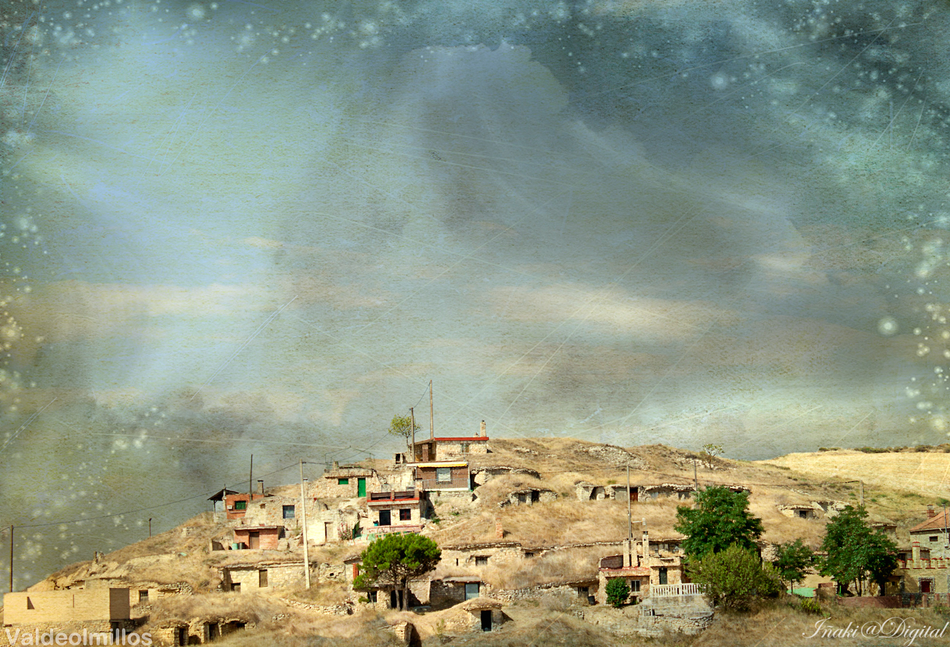 Bodegas 2012